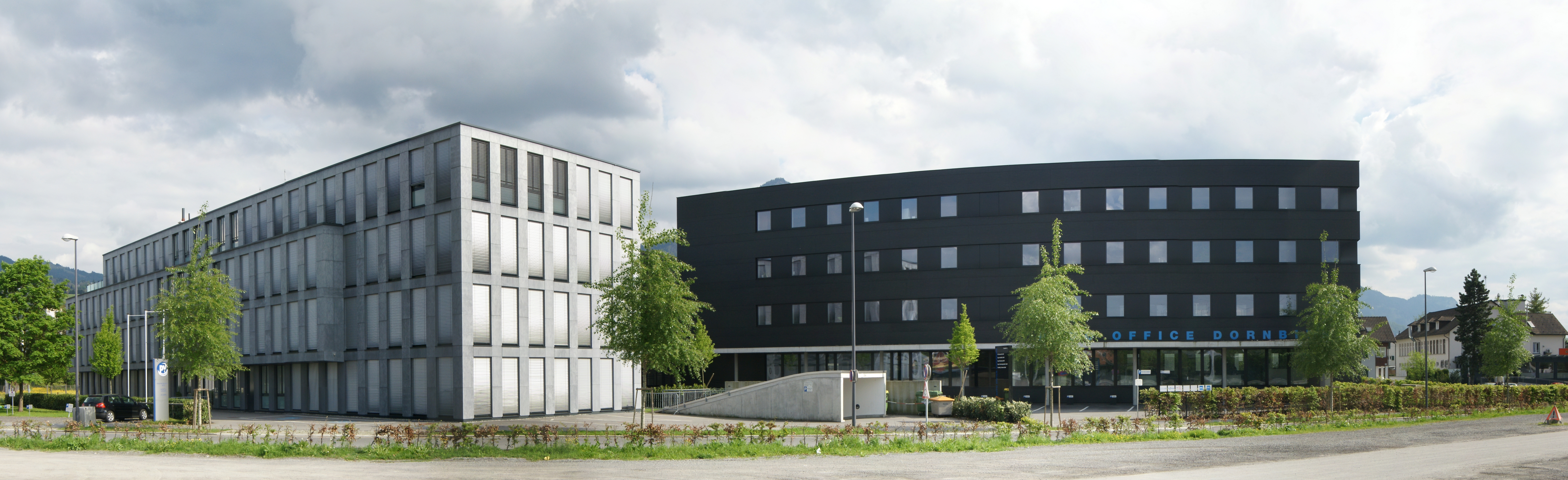 Pensionsversicherungsanstalt und HYPO OFFICE in Dornbirn.